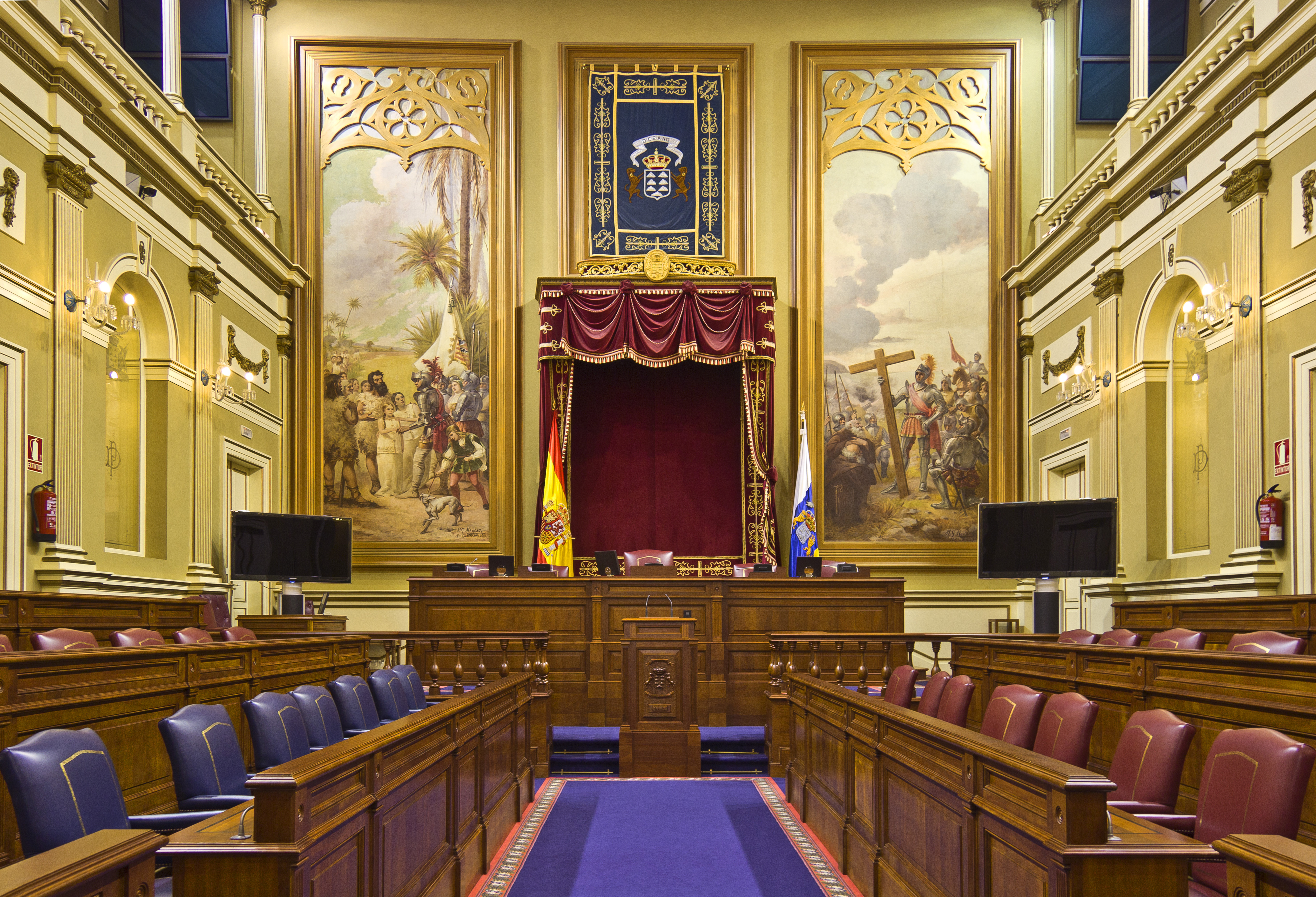 Plenarsaal des Parlaments der Kanarischen Inseln (Parlamento de la Comunidad autónoma de Canarias) in Santa Cruz de Tenerife.